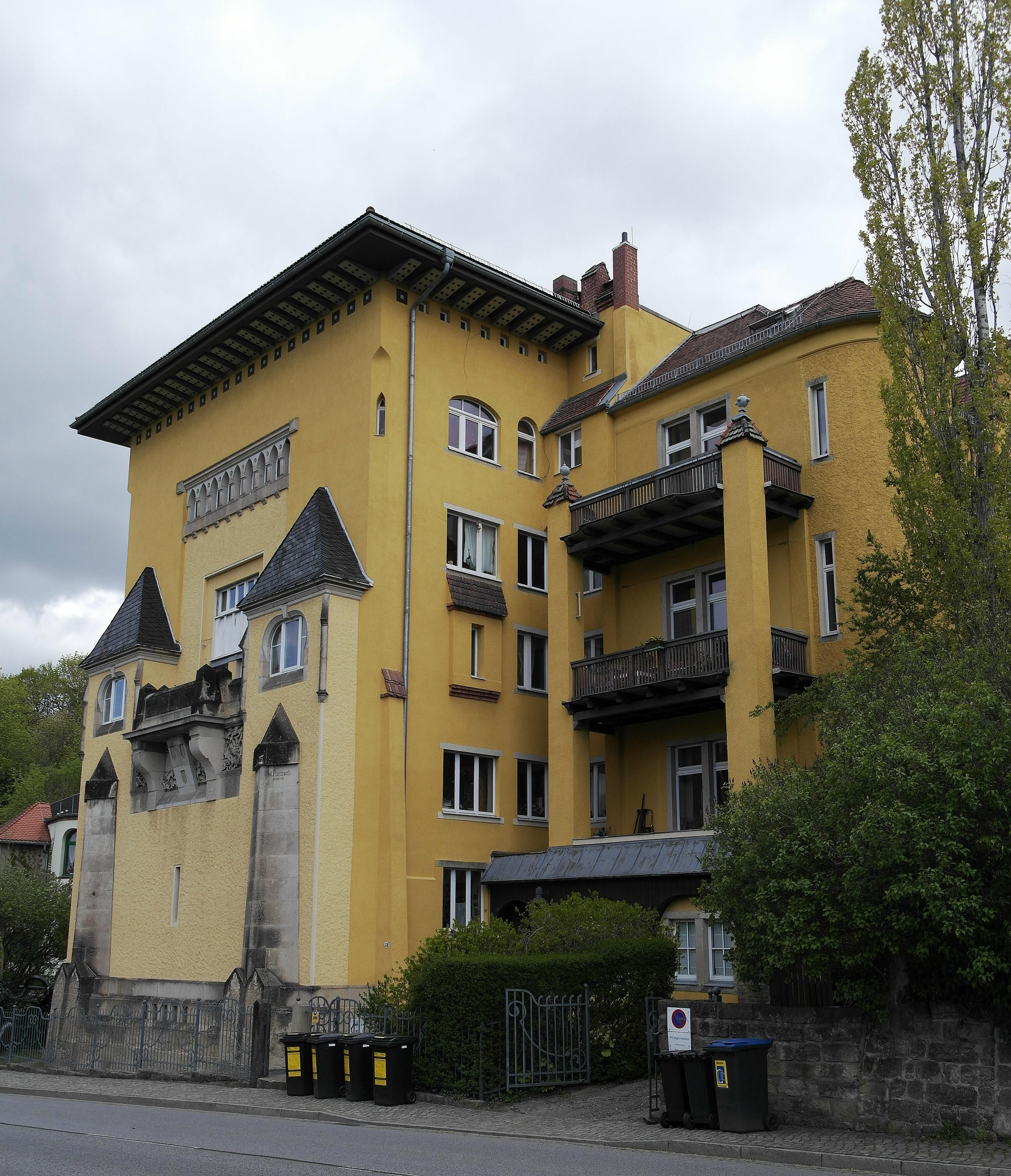 Dresdener Künstlerdomizils am Löschwitzer Elbhang, erbaut 1897-98 nach Entwürfen des Dresdener Architekten Martin Pietzsch.